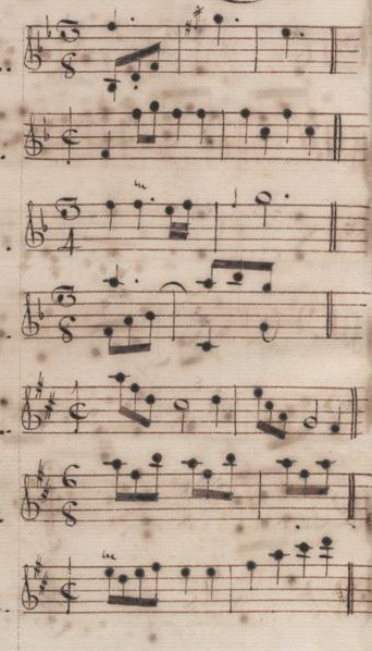 Table du volume V des manuscrits de Venise (incipit des sonates 8 à 14, K. 273 à 279).